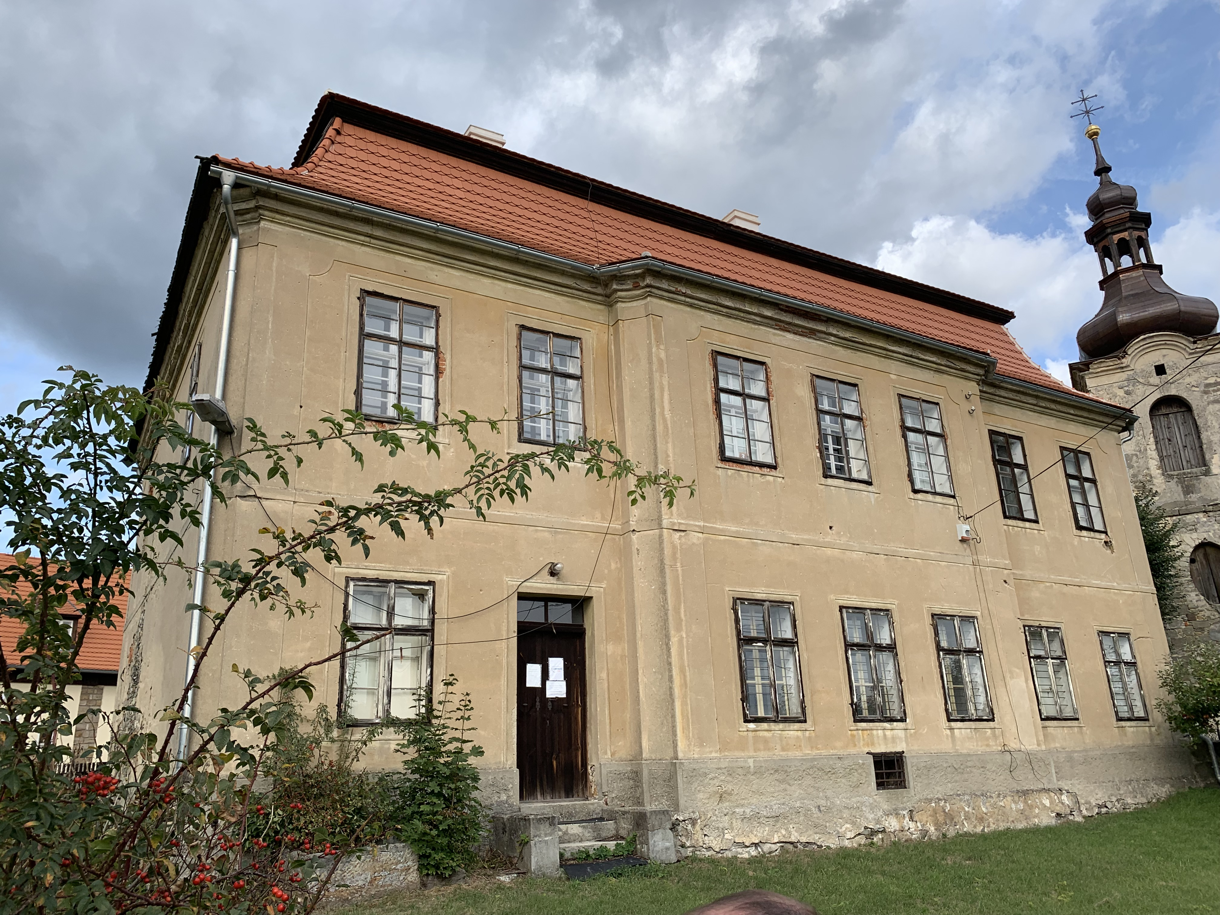 Fara a kostel sv. Jiljí v obci Bezděz